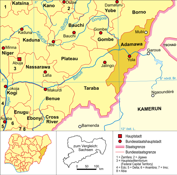 Politische Karte Nigerias (Bundesstaat Adamawa hervorgehoben)